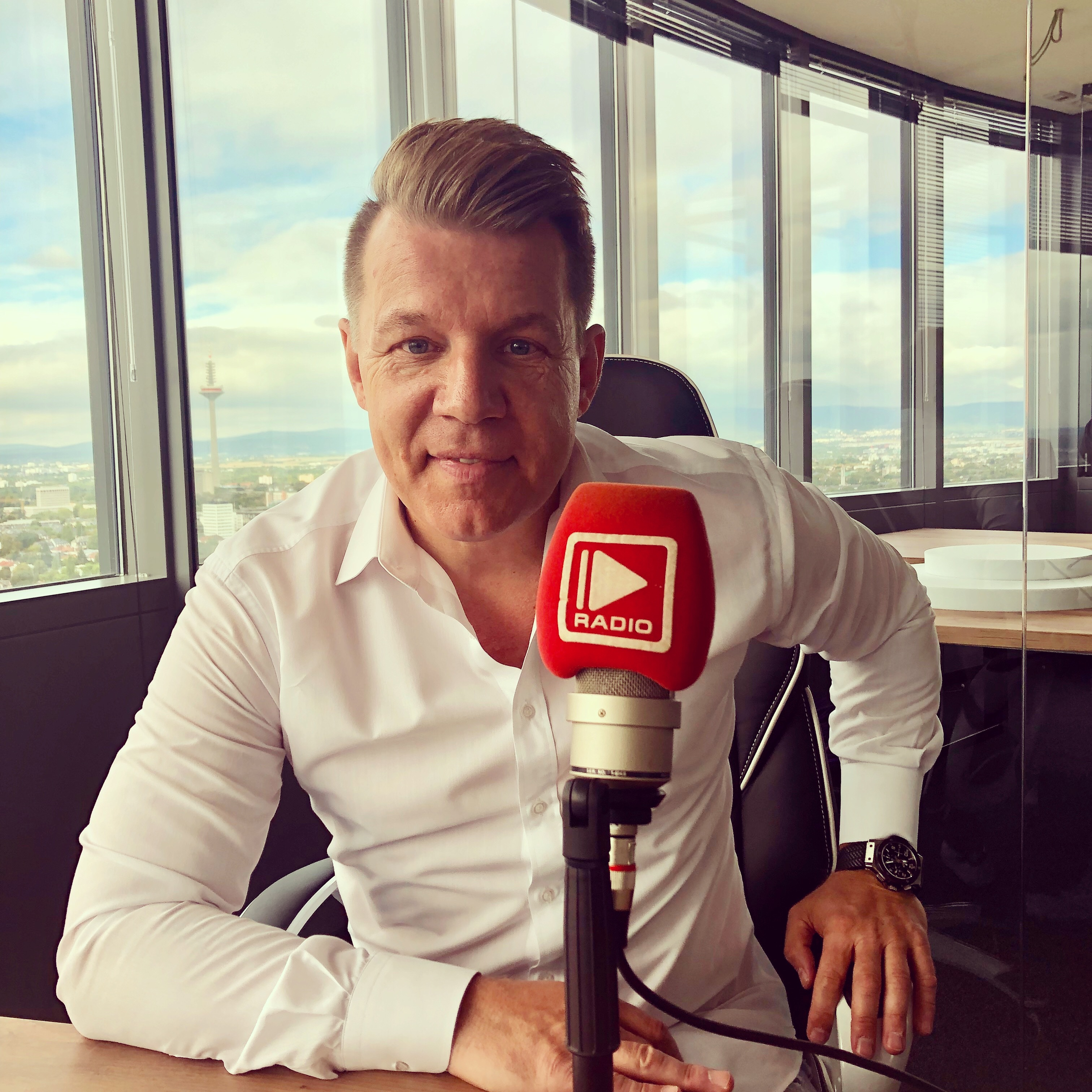 Axel Kahn, Radio Antenne Frankfurt „Der helle KAHNSINN“ Axel Kahn trifft... Jeden Sonntag zwischen 11:00 - 12:00 Uhr